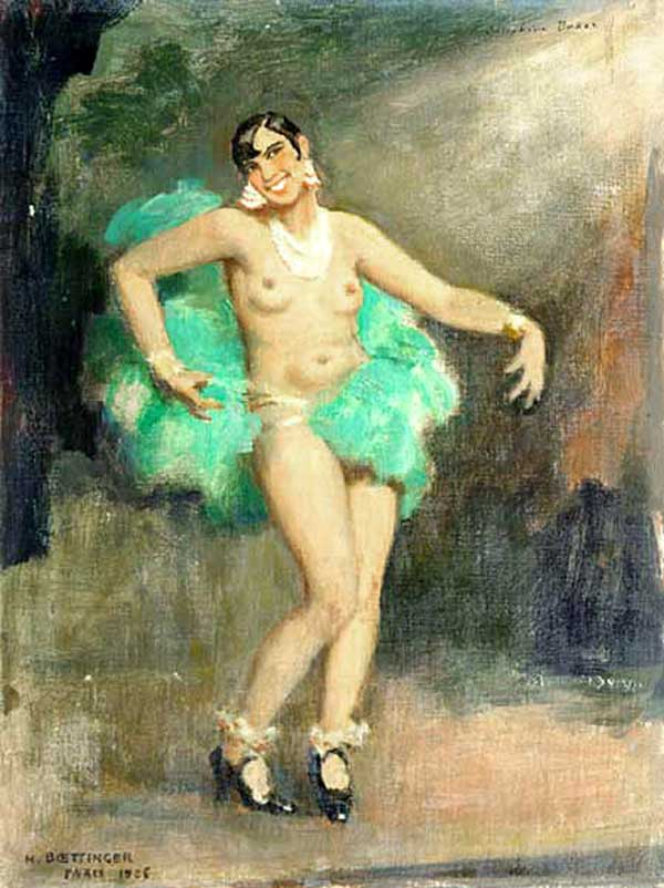 Josephine Baker, Paris 1925